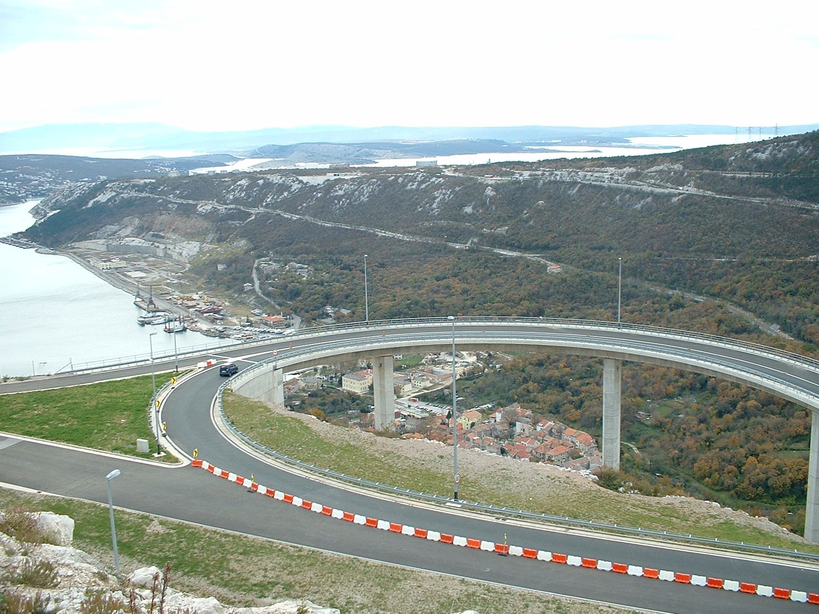 Sv. Kuzam - tobogan